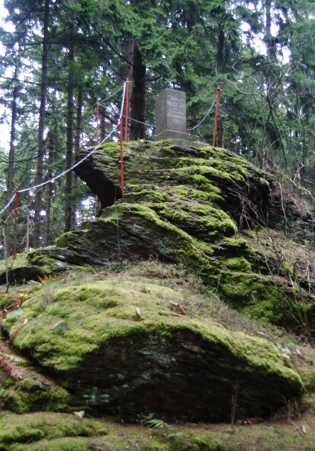 Adlerstein